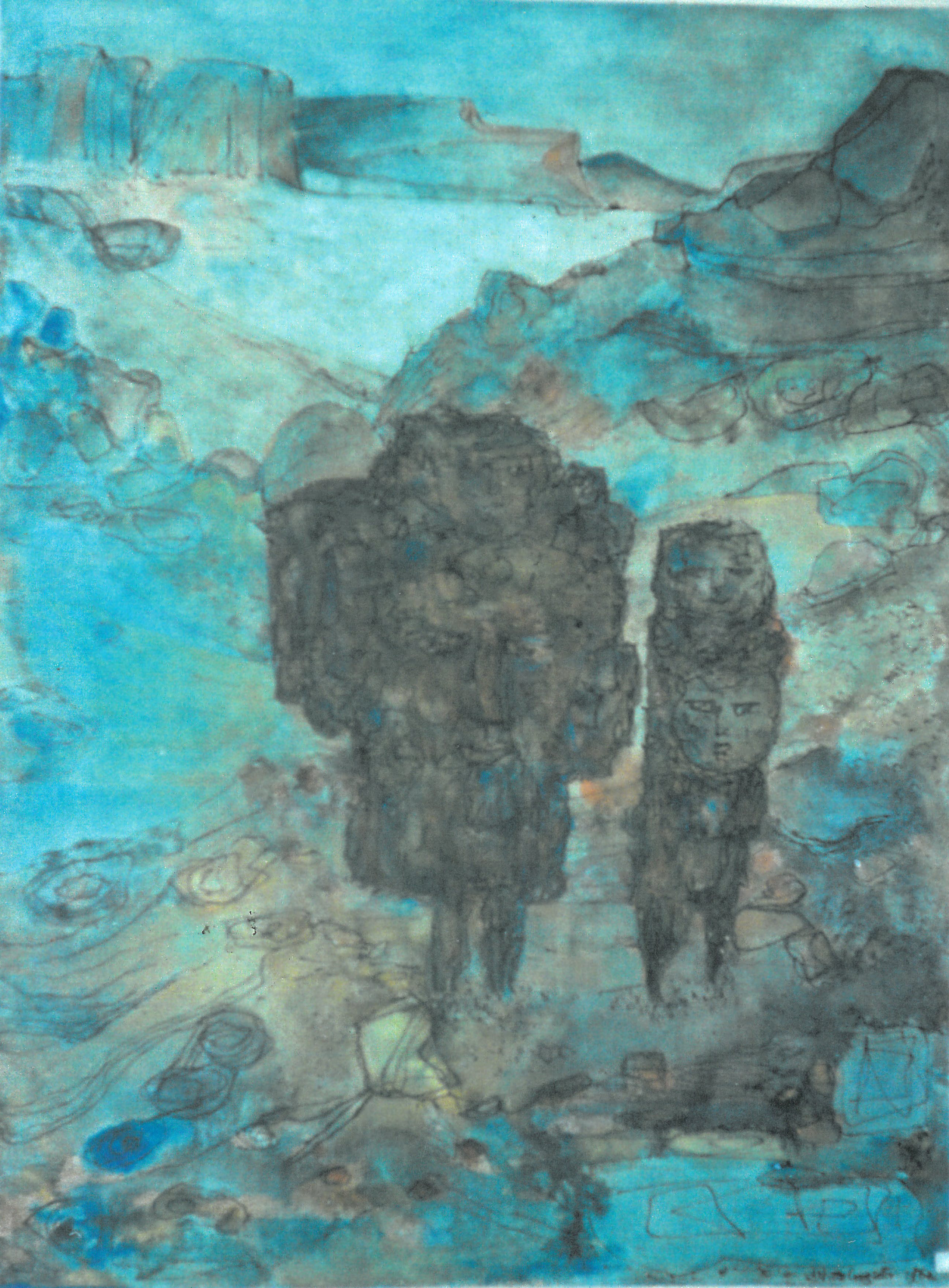 Le roi et la reine, gouache, Musée Pouchkine, artiste: Jean Vincent de Crozals